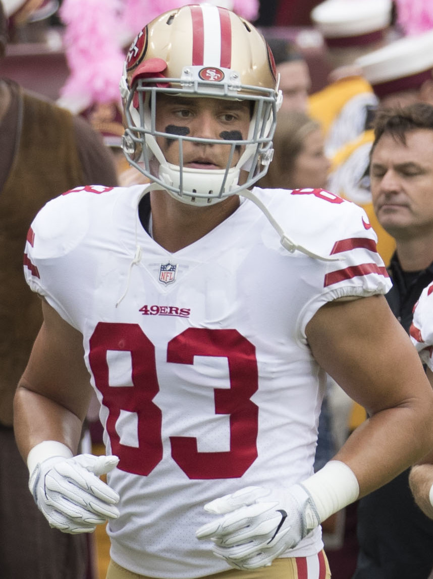 49ers at Redskins 10/15/17